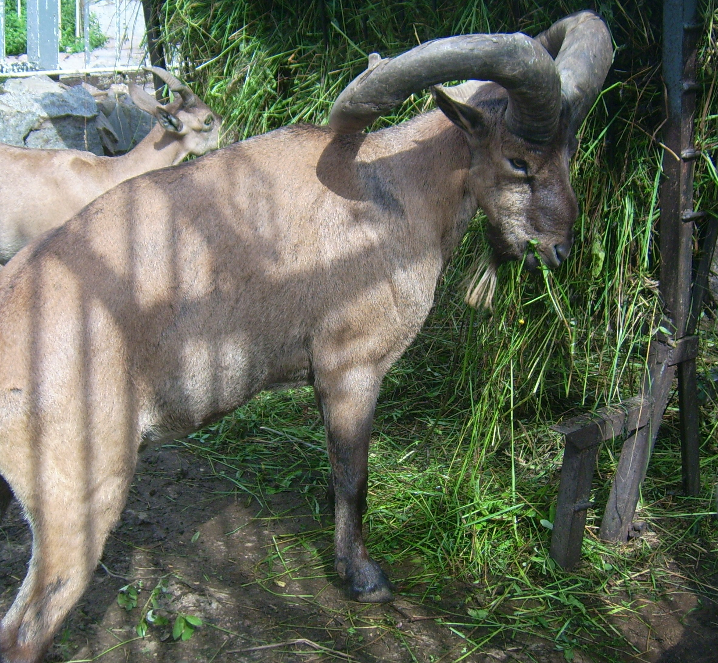 Capra cylindricornis at Moskau Zoo